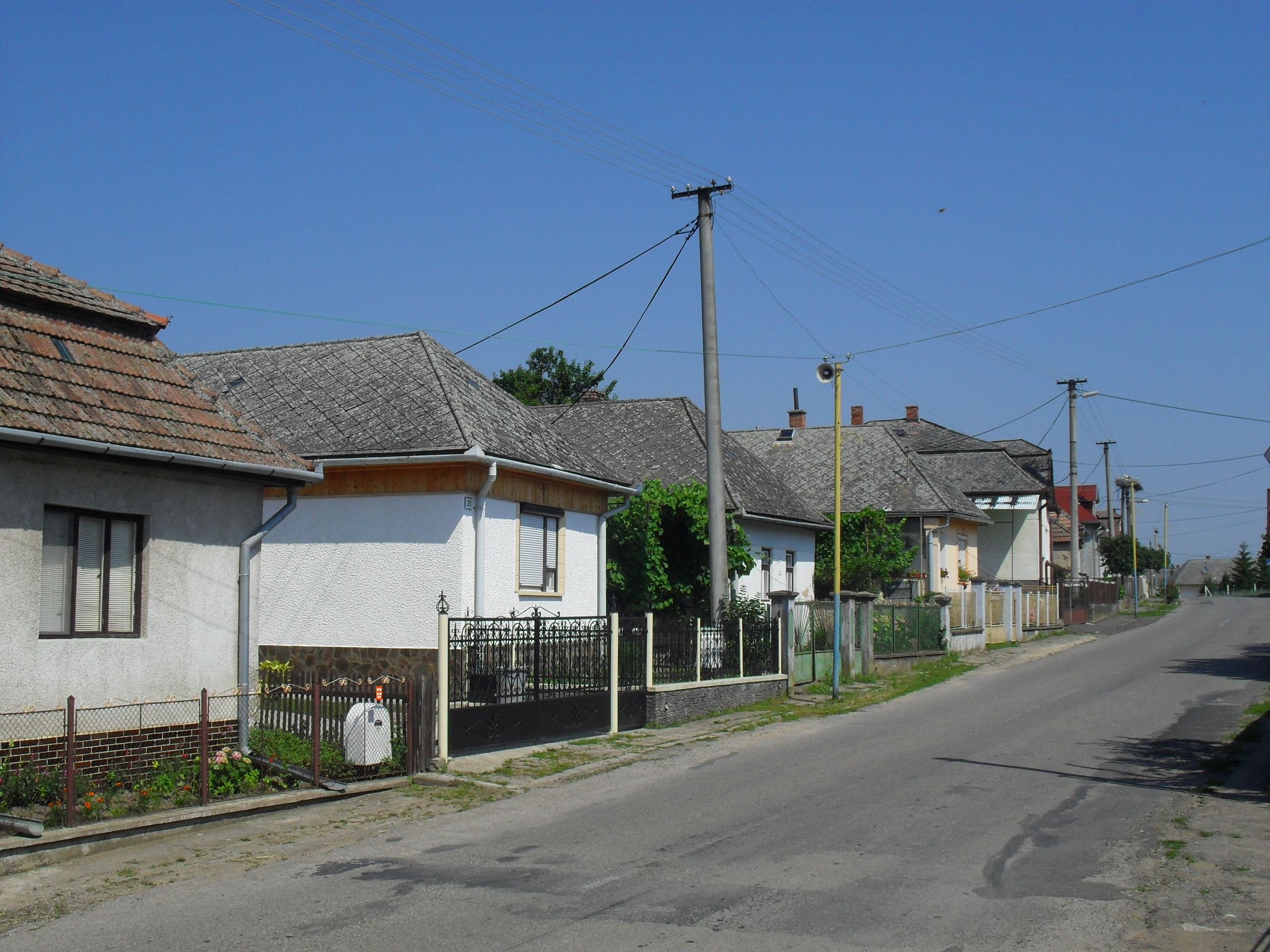 Zemplén - utcakép